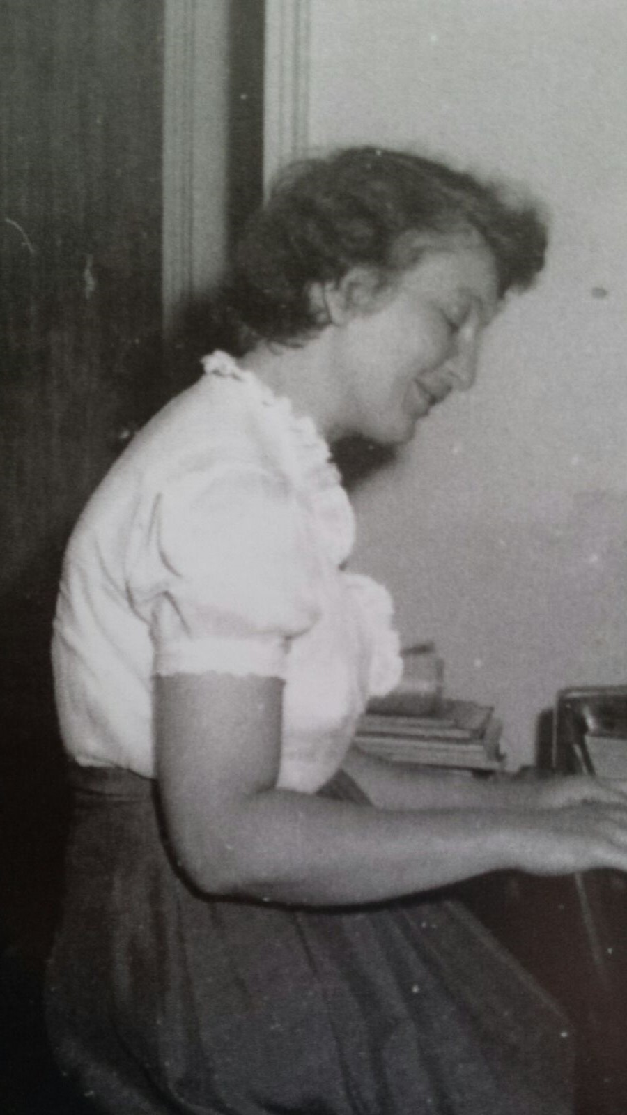 רבקה גוילי ליד הפסנתר